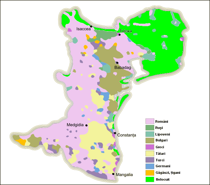 Structura populaţiei Dobrogei pe criterii etnice la începutul secolului al XX-lea, după un studiu al lui Grégoire Danesco, Dogrogea (La Dobroudja). Étude de Geographie physique et ethnographique, Imprimerie de l'Indépendance Roumaine, Bucarest, 1903.